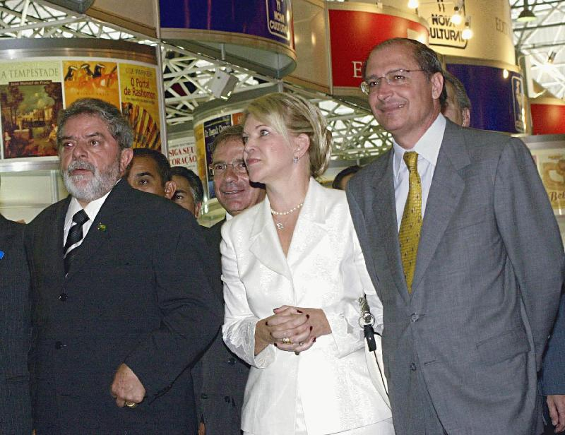 O Presidente Luiz Inácio Lula da Silva, a prefeita de São Paulo, Marta Suplicy, e o governador de São Paulo, Geraldo Alckmin, durante visita aos estandes da 18ª Bienal Internacional do Livro de São Paulo.